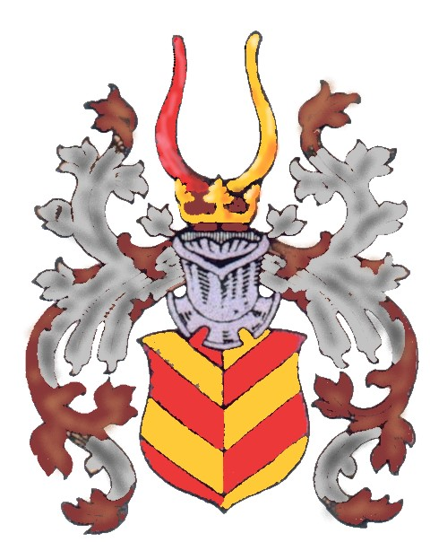 Erb Blektů z Utěchovic